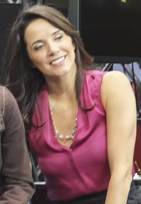 Michelle morgan en 2015